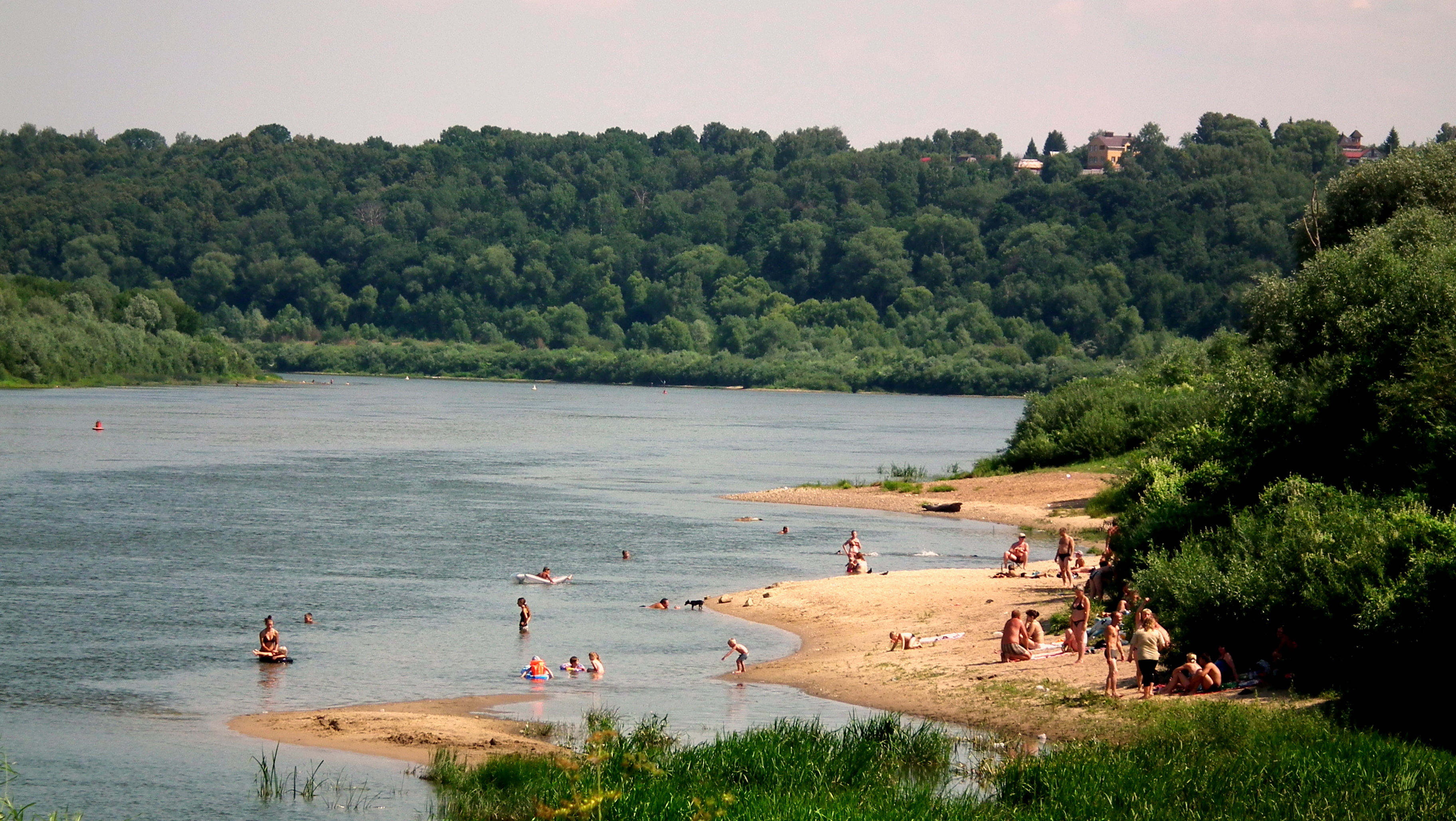 Caluga beach